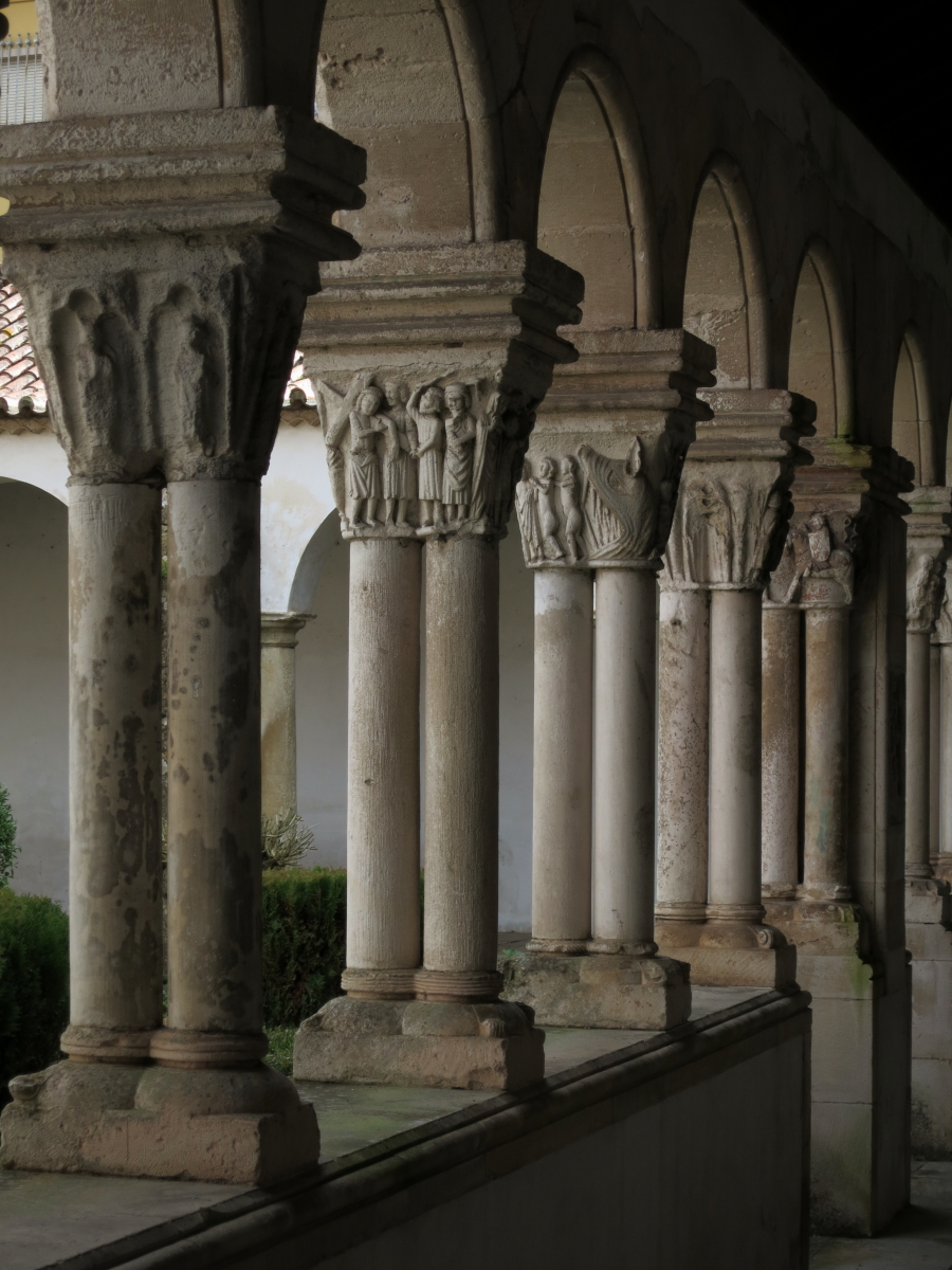 Claustro, Mosteiro de Celas, Coimbra